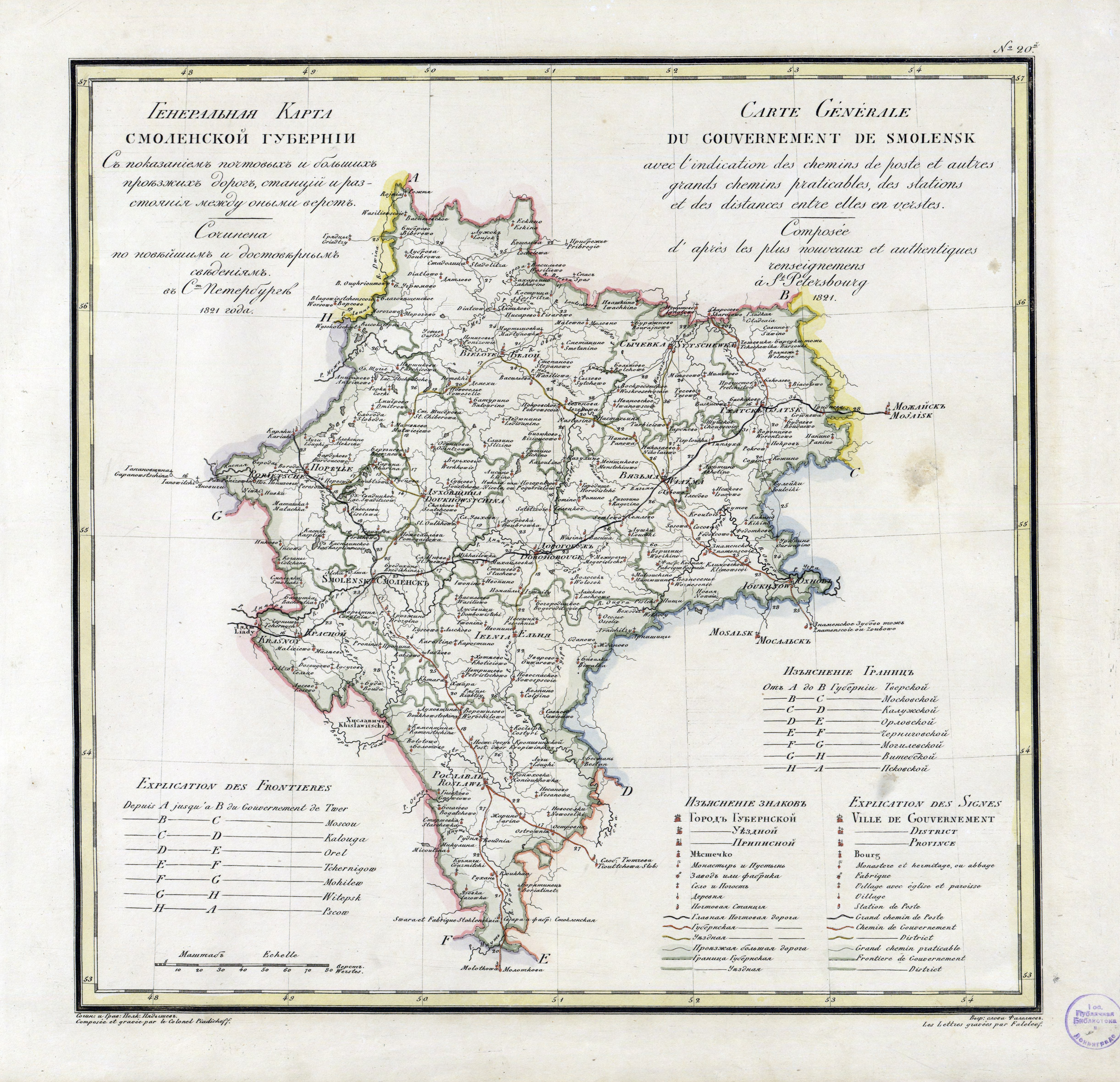 Карта Смоленской губернии